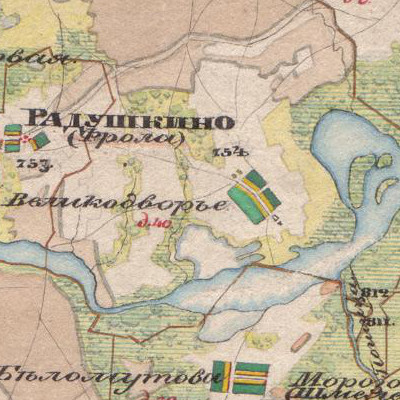 Деревня Великодворье на карте 1850 года